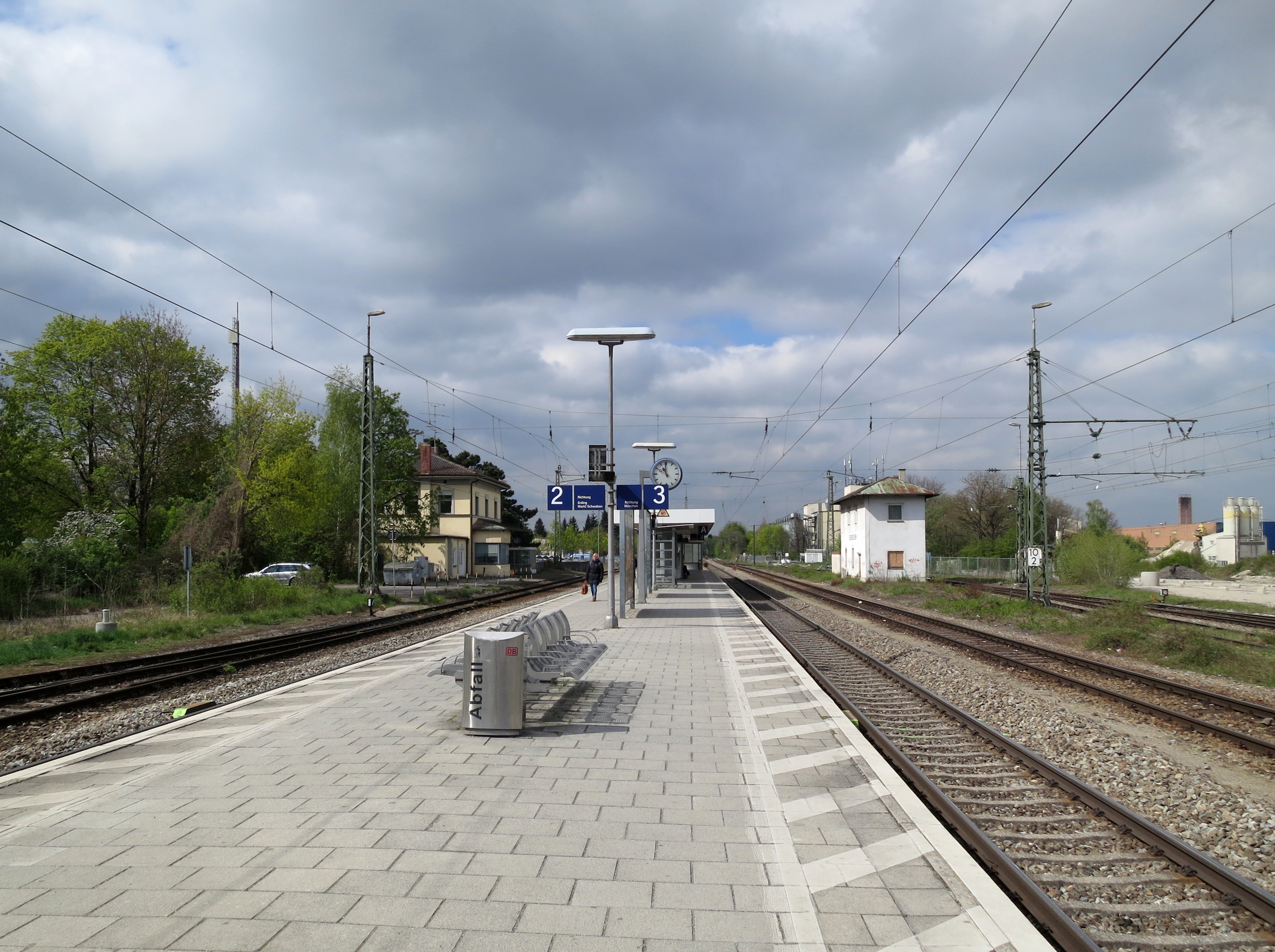 Mittelbahnsteig des Bahnhofs Feldkirchen (b München) vor dem barrierefreien Ausbau, links das Empfangsgebäude, rechts das ehemalige Wärterstellwerk